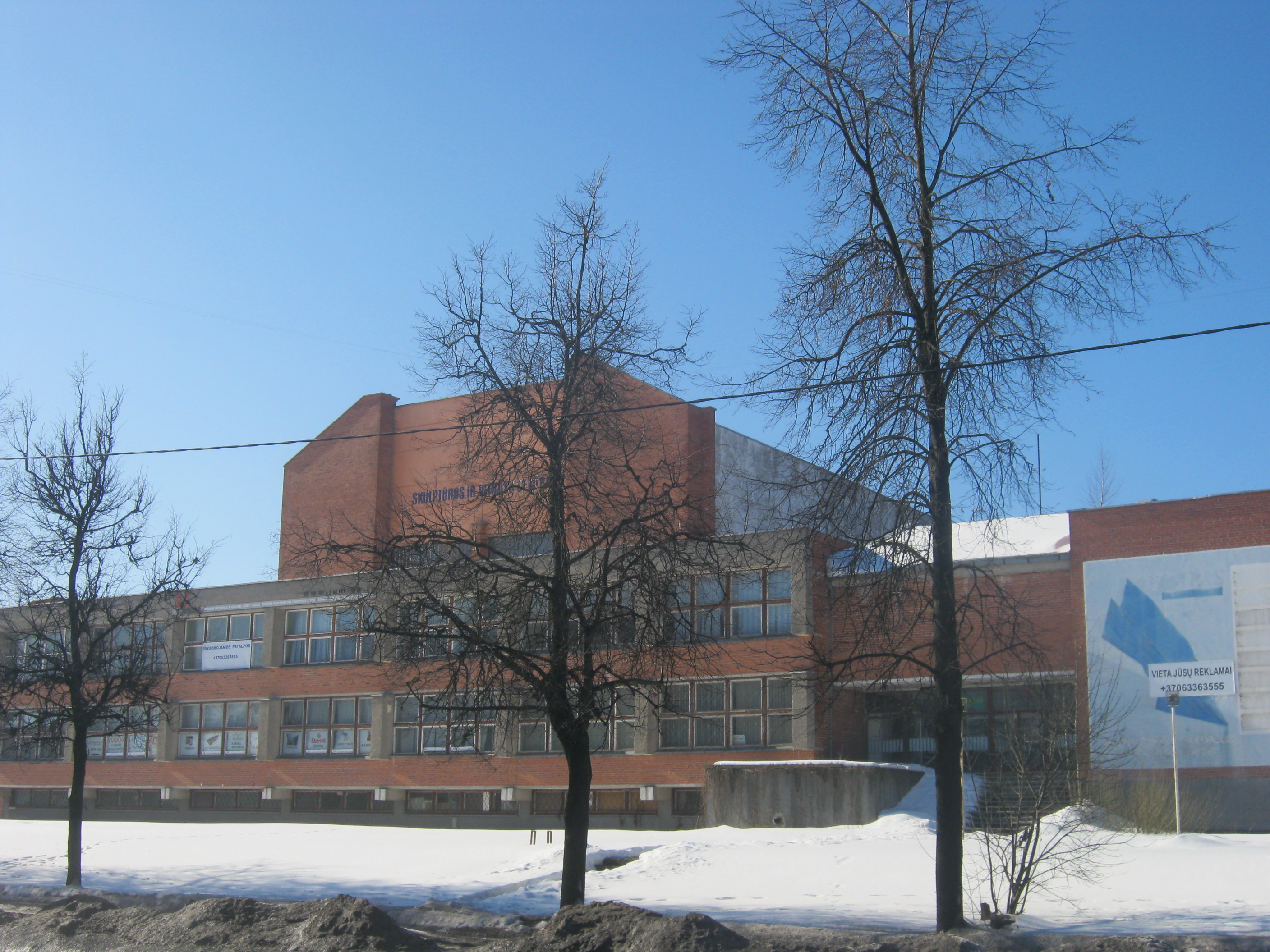 Vilnius